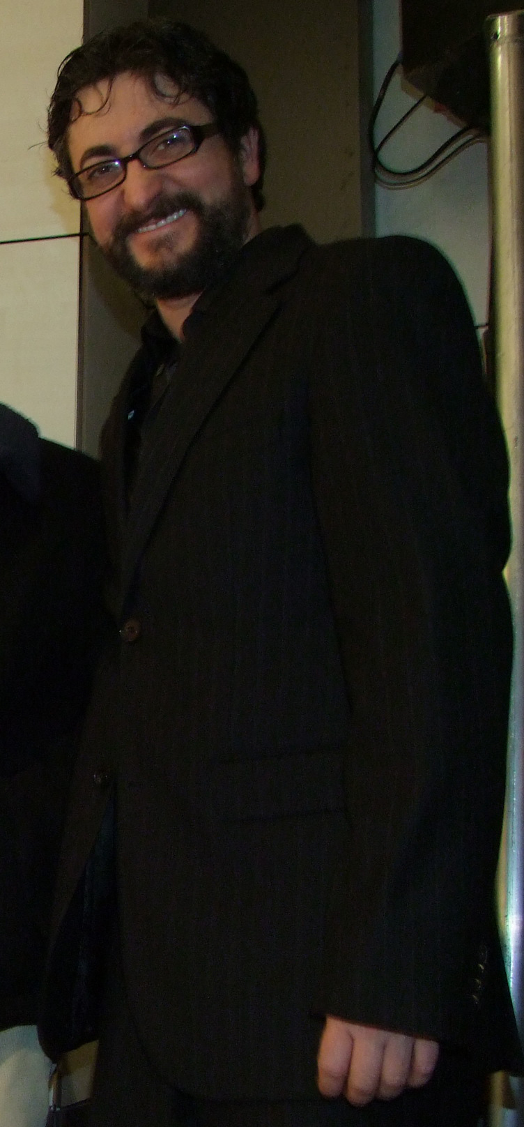 Gorka Aginagalde aktore gasteiztarra 2010ean.